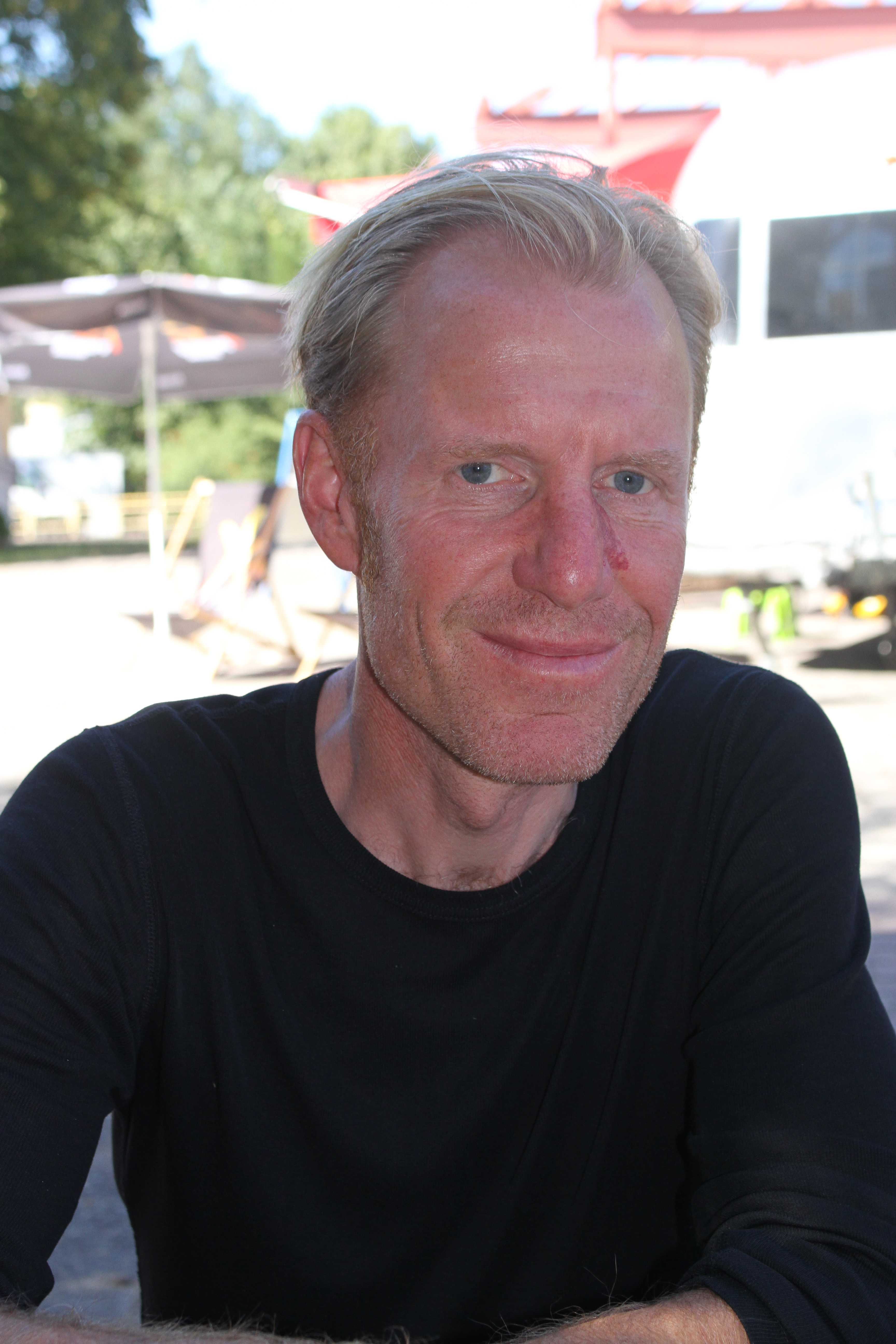 Jan Schur, deutscher Radsportler